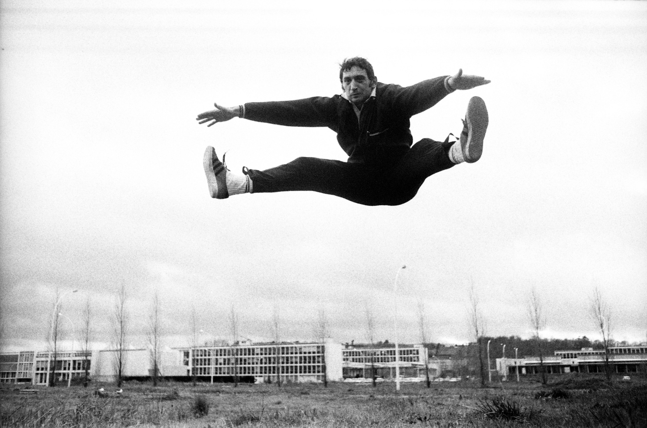 Université Paul Sabatier. Le 3 février 1970. Vue de Pierre Villepreux, joueur du Stade Toulousain, qui s'entraîne sur un terrain de l'Université Paul Sabatier.